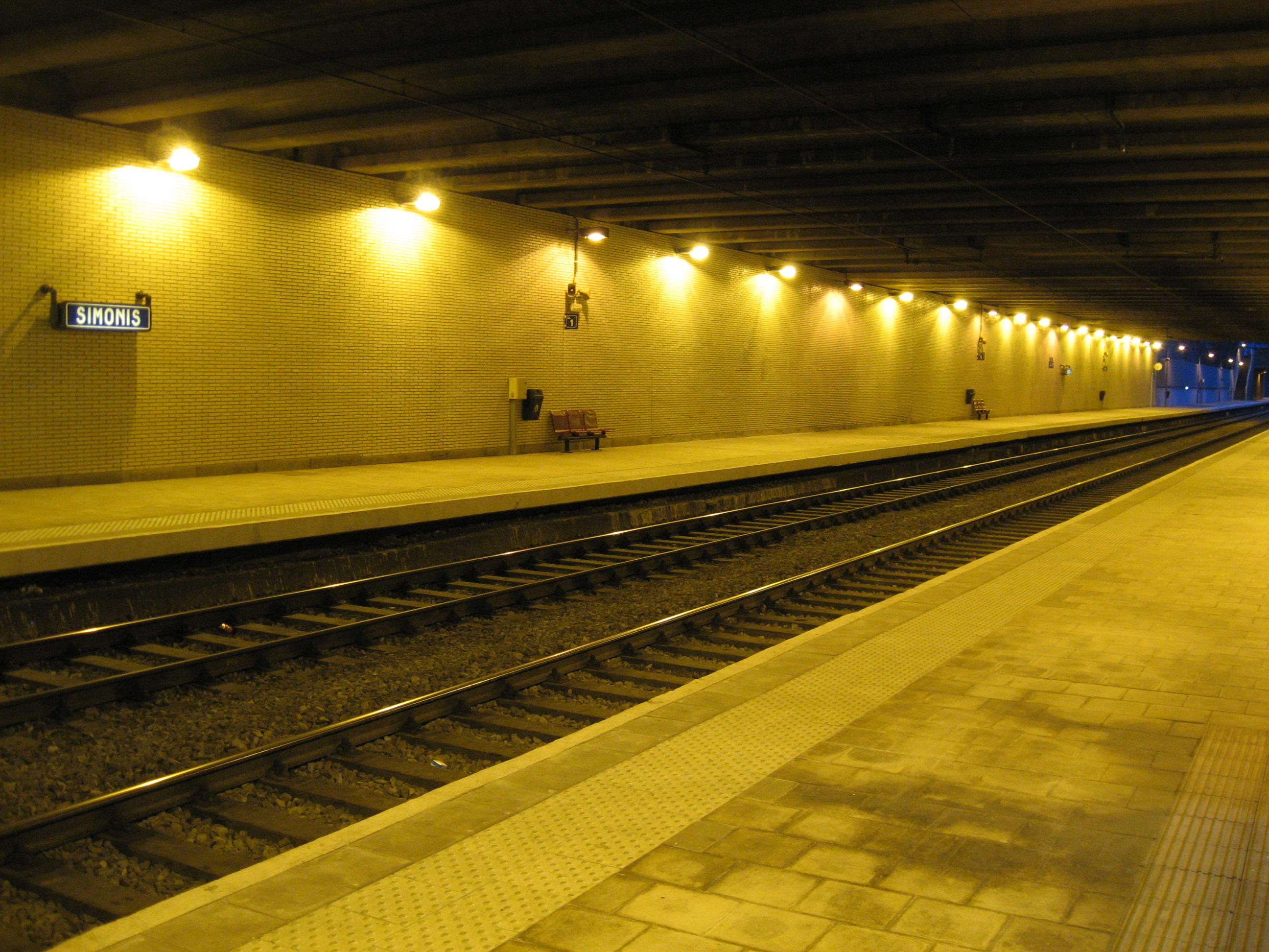 Heropende spoorstation Simonis op de Brusselse Westring.